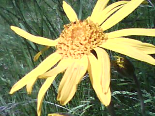 Arnikablüte auf den Gimmlitzwiesen (NSG D 67 „Gimmlitzwiesen“ im Landkreis Sächsische Schweiz-Osterzgebirge, Sachsen)